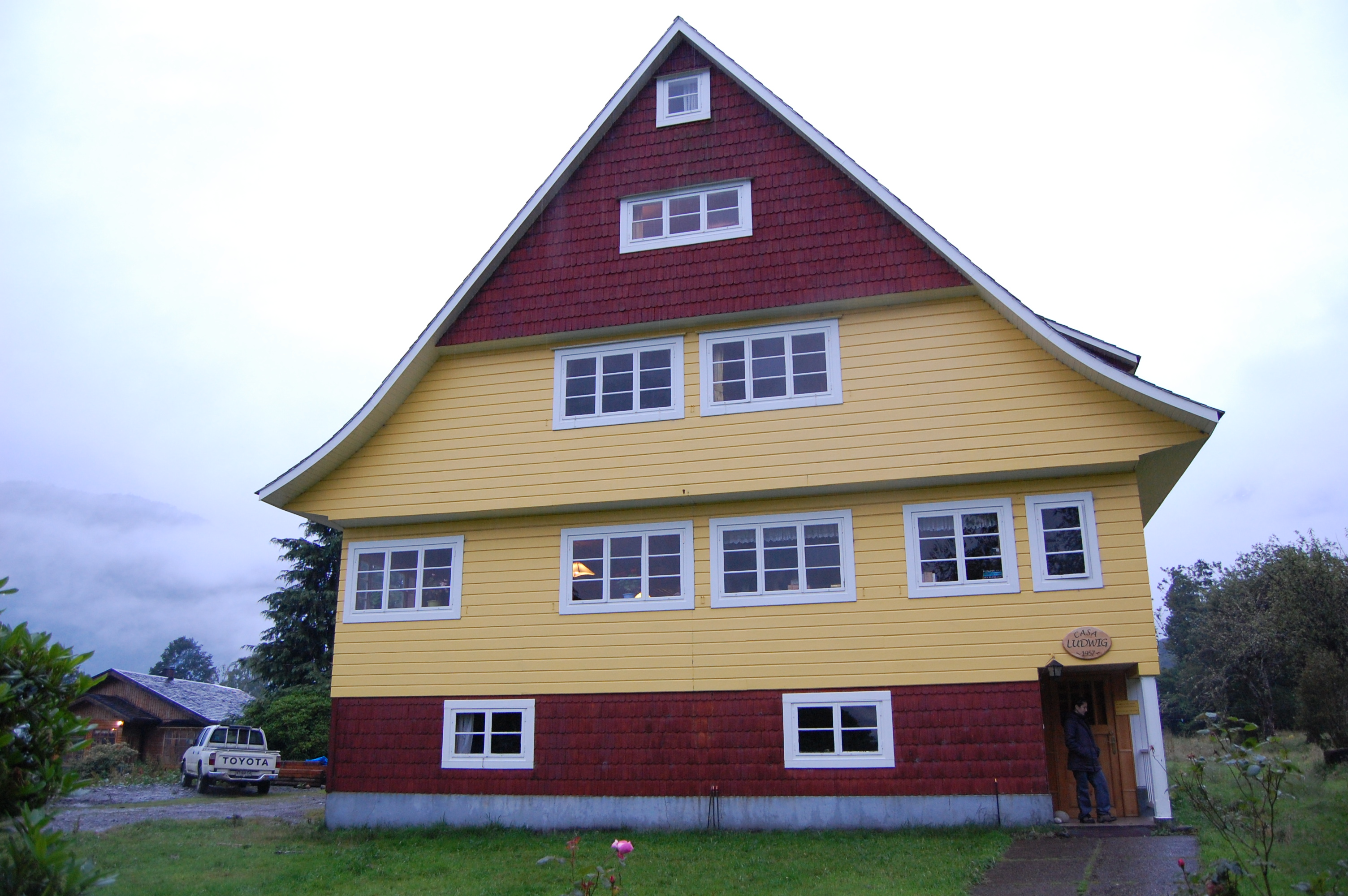 CASA LUDWIG hotel, Residencial, Puyuhuapi - Patagonia - Chile, Bed & Breakfast, Alojamiento con desayuno This is a photo of a national monument in Chile: 2205